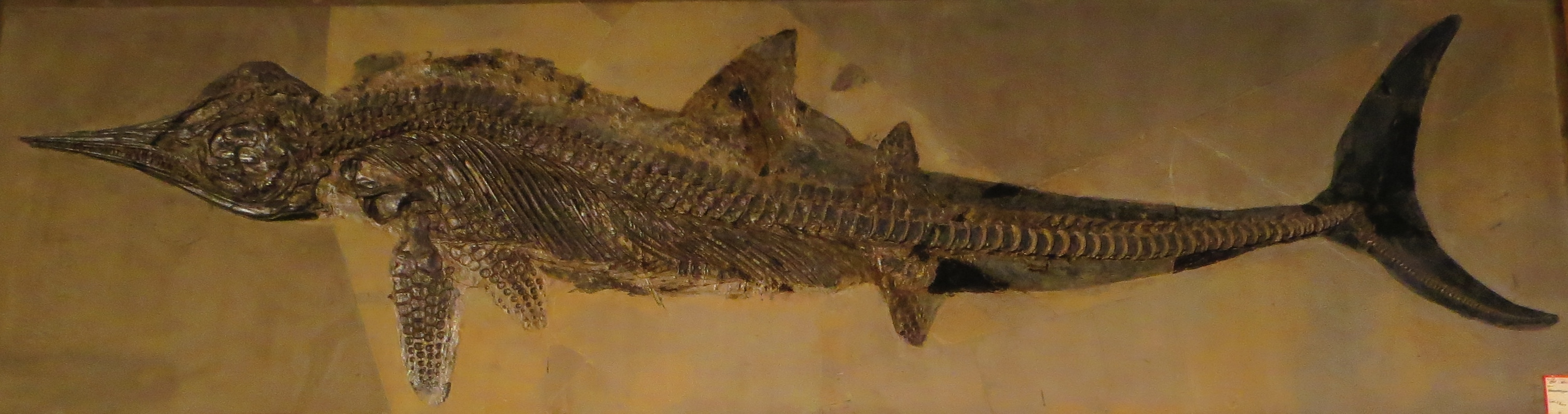 Fossil of Hauffiopteryx, an extinct reptile- Took the picture at Museum of Paleontology, Tuebingen